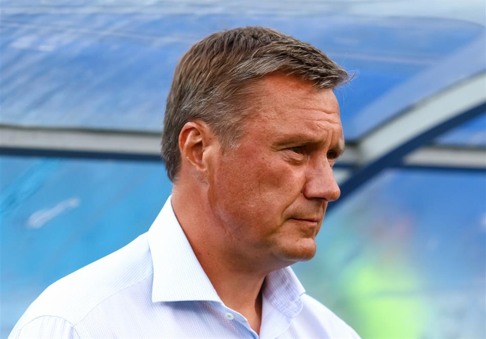 Олександр Хацкевич - білоруський футбольний тренер.